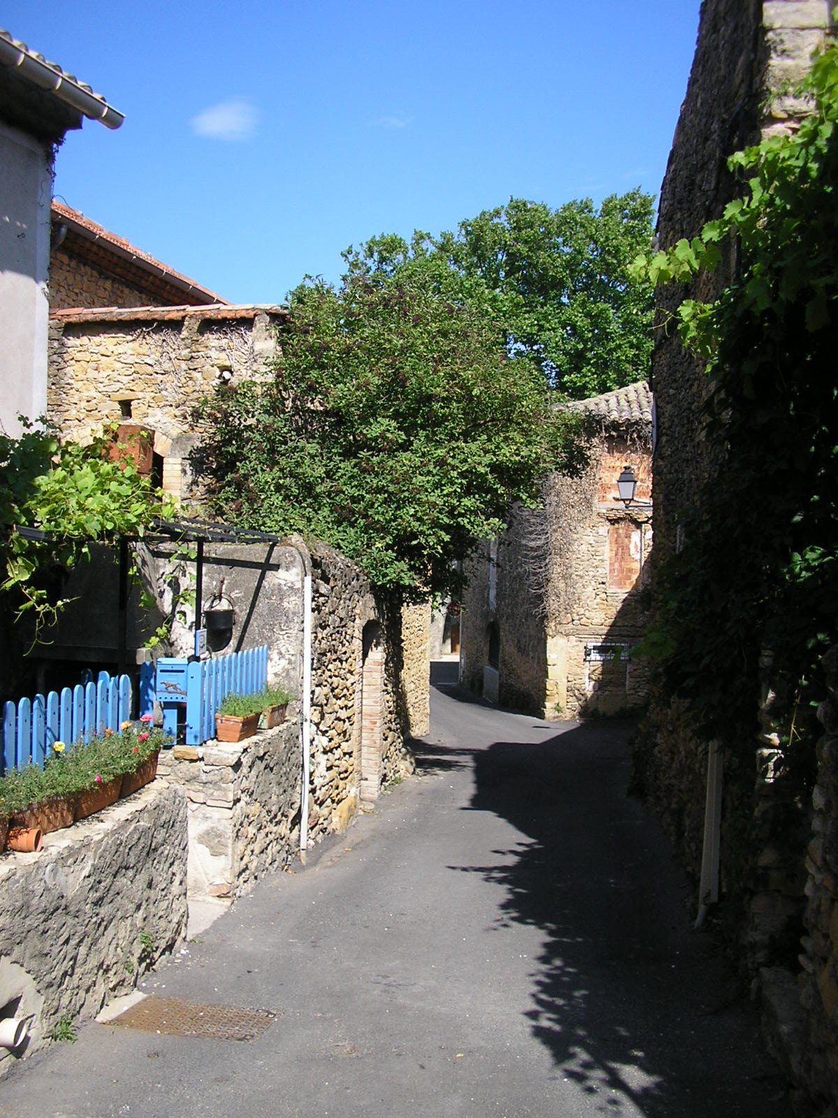 Rue d'Uchaux